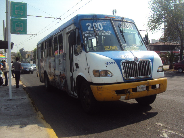 Autobús de la ruta 200 de Guadalajara, México